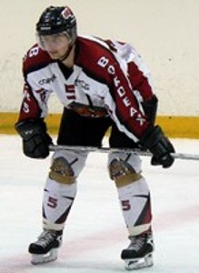 Photo de Jan Majercak, joueur de Hockey sur glace